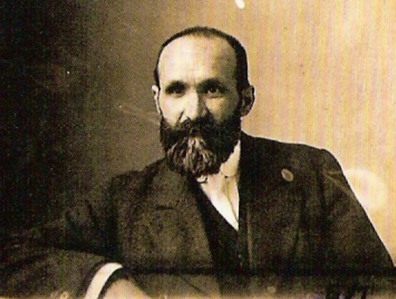 Retrato del profesor y pedagogo Ángel Llorca.